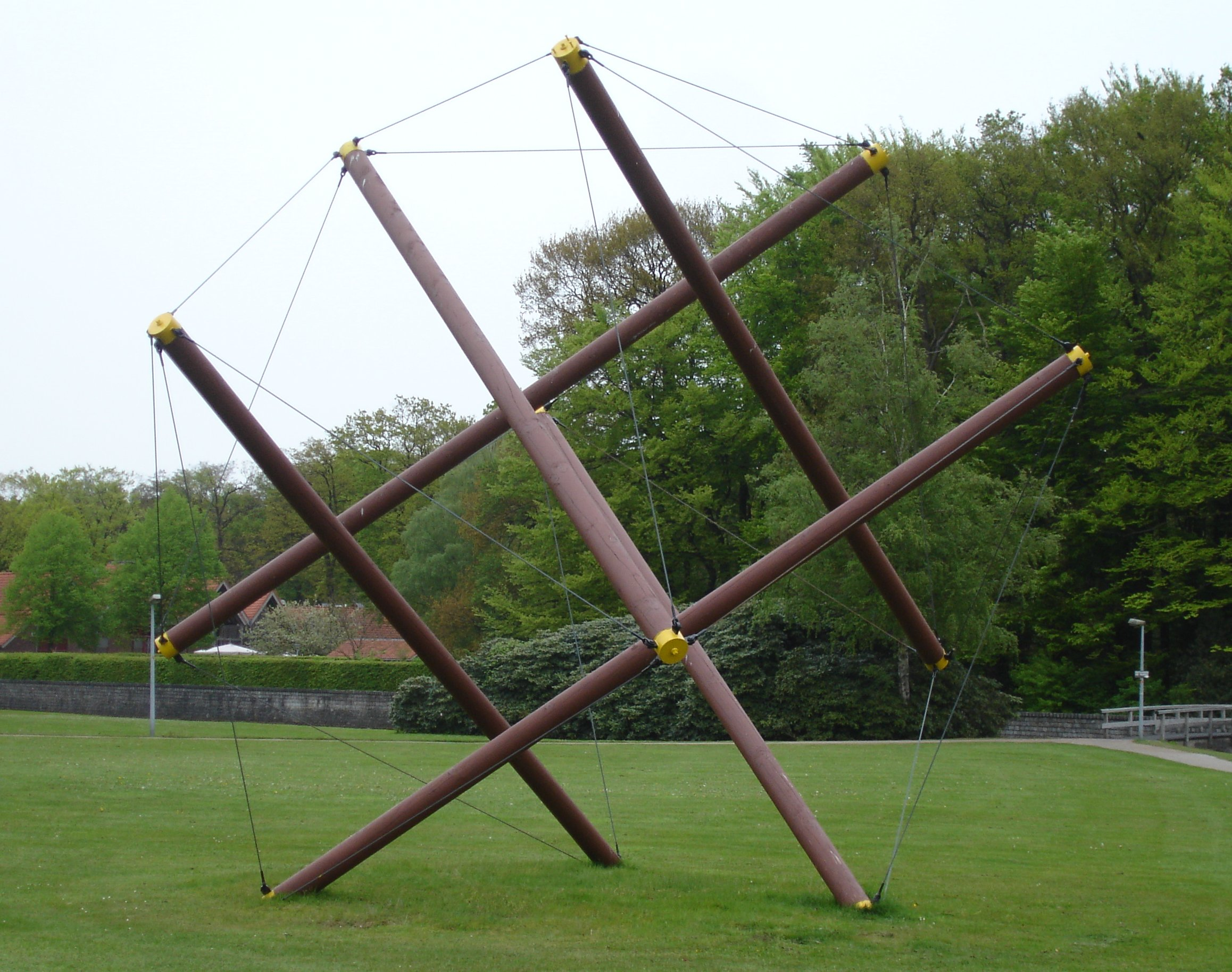 Het Ding, kunstwerk op Universiteit Twente, gemaakt door studenten Jaap Hos, Jasper Latté en Frits van den Berg